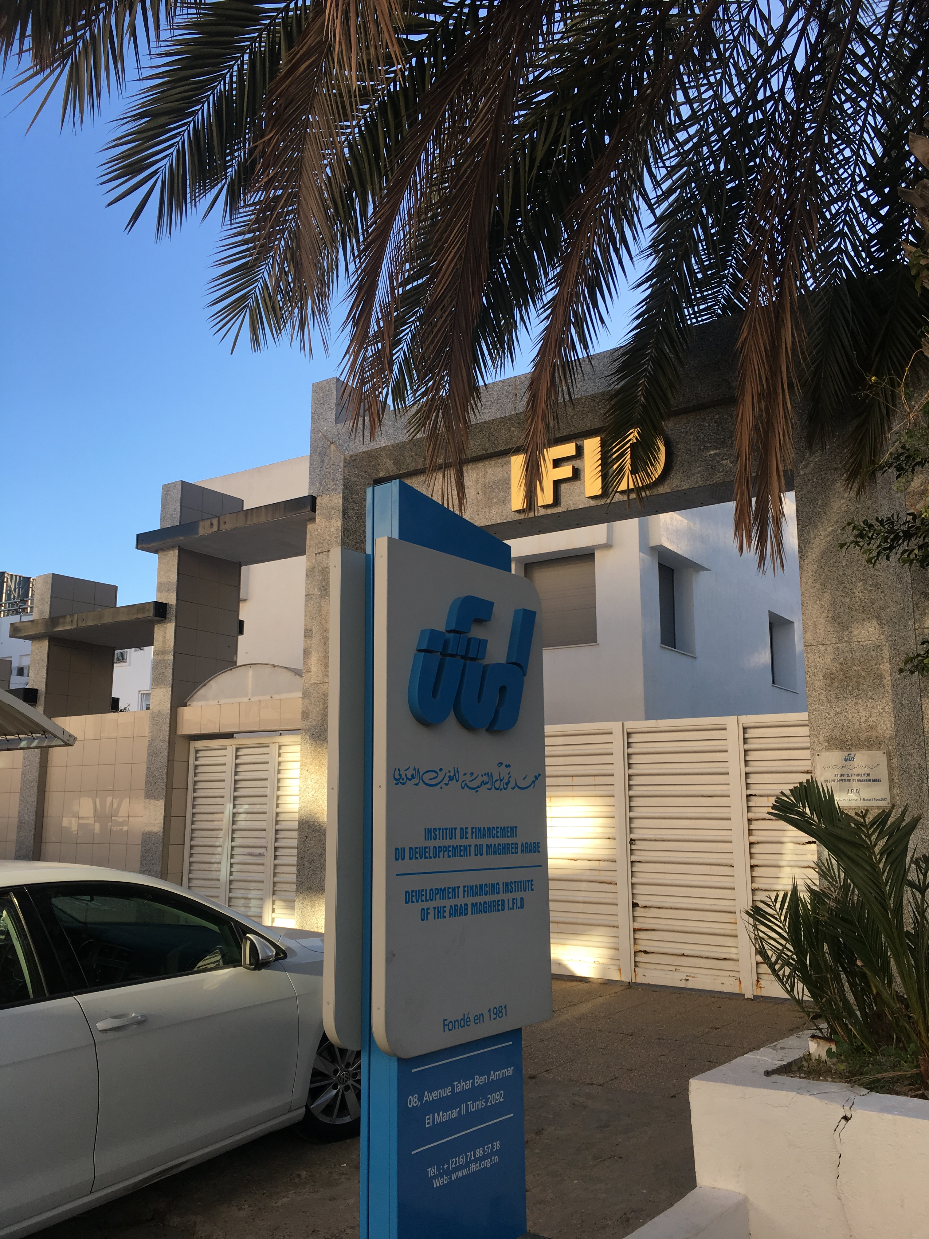 Institut de financement du développement du Maghreb arabe (quartier El Manar), Tunis, 2020.